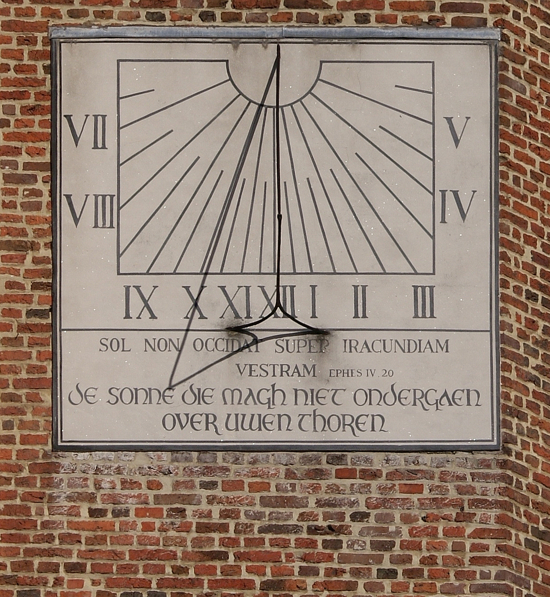 Zonneklok uit de 16-de eeuw.